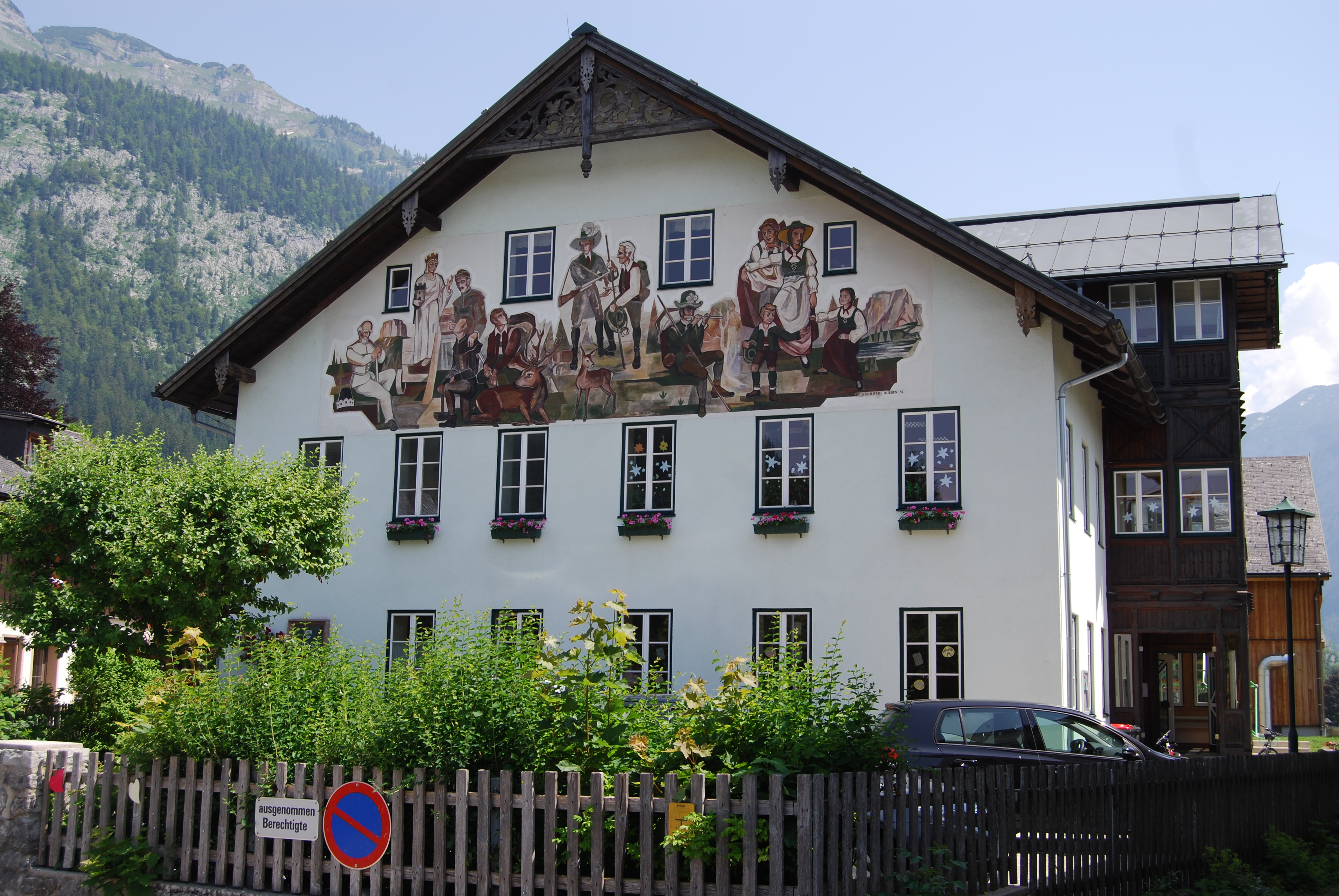 Volksschule, Wandmalerei von S.Schwab - Trieben 57